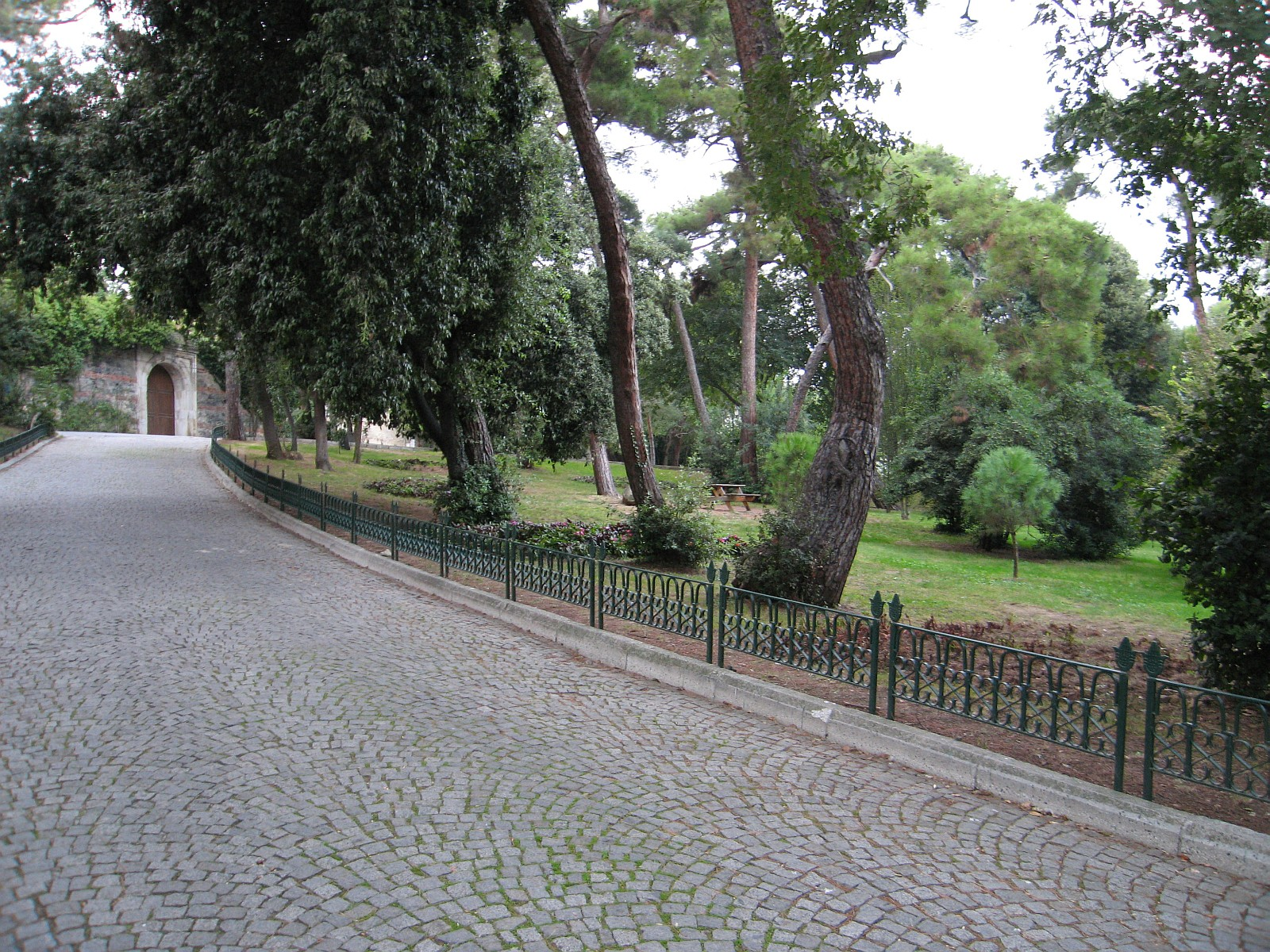 A scene from Yıldız Park in Istanbul, Turkey.